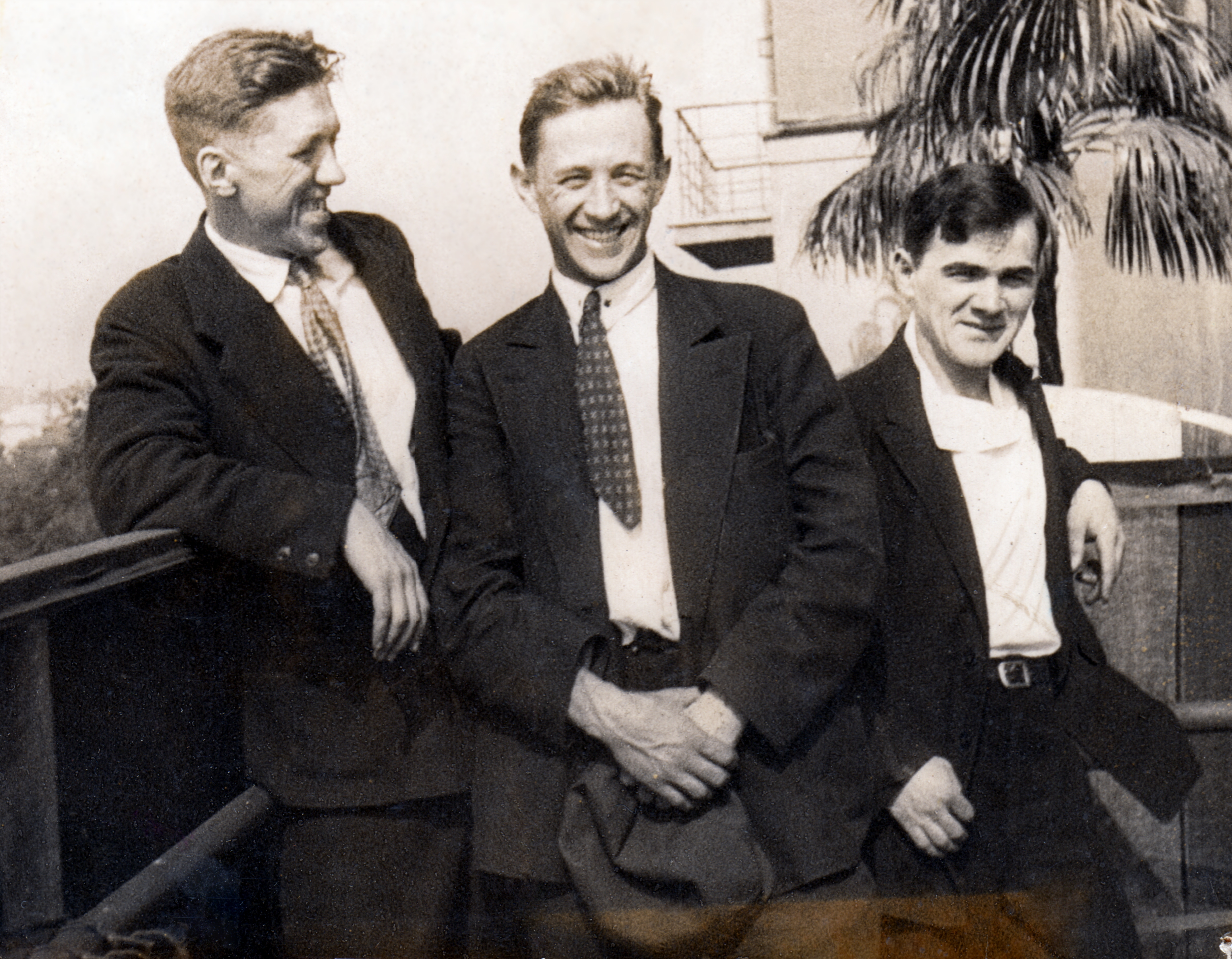 С. Маркин с друзьями